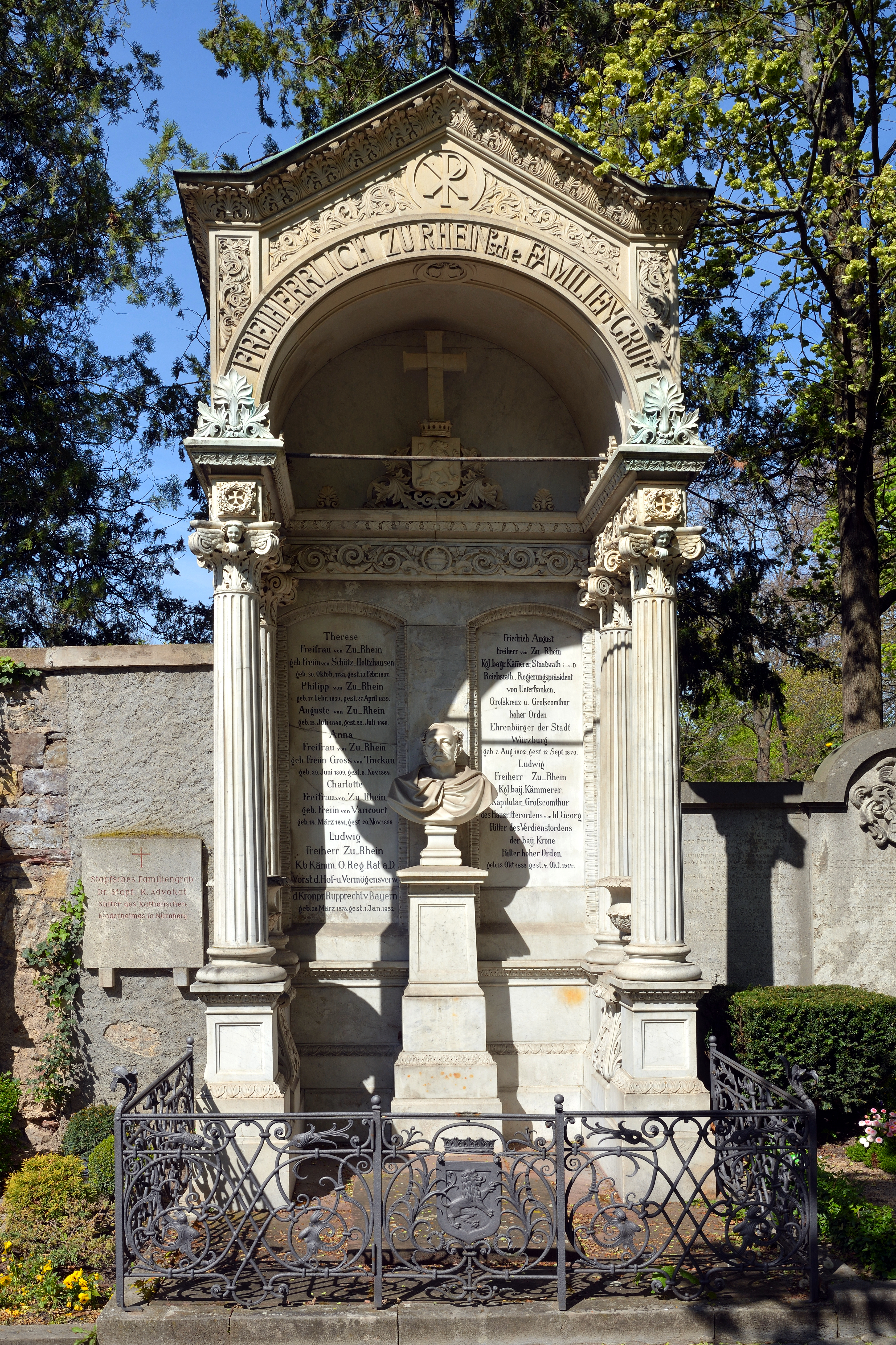 Impressionen vom Hauptfriedhof Würzburg Grabmal von Friedrich August Freiherr von Zu-Rhein